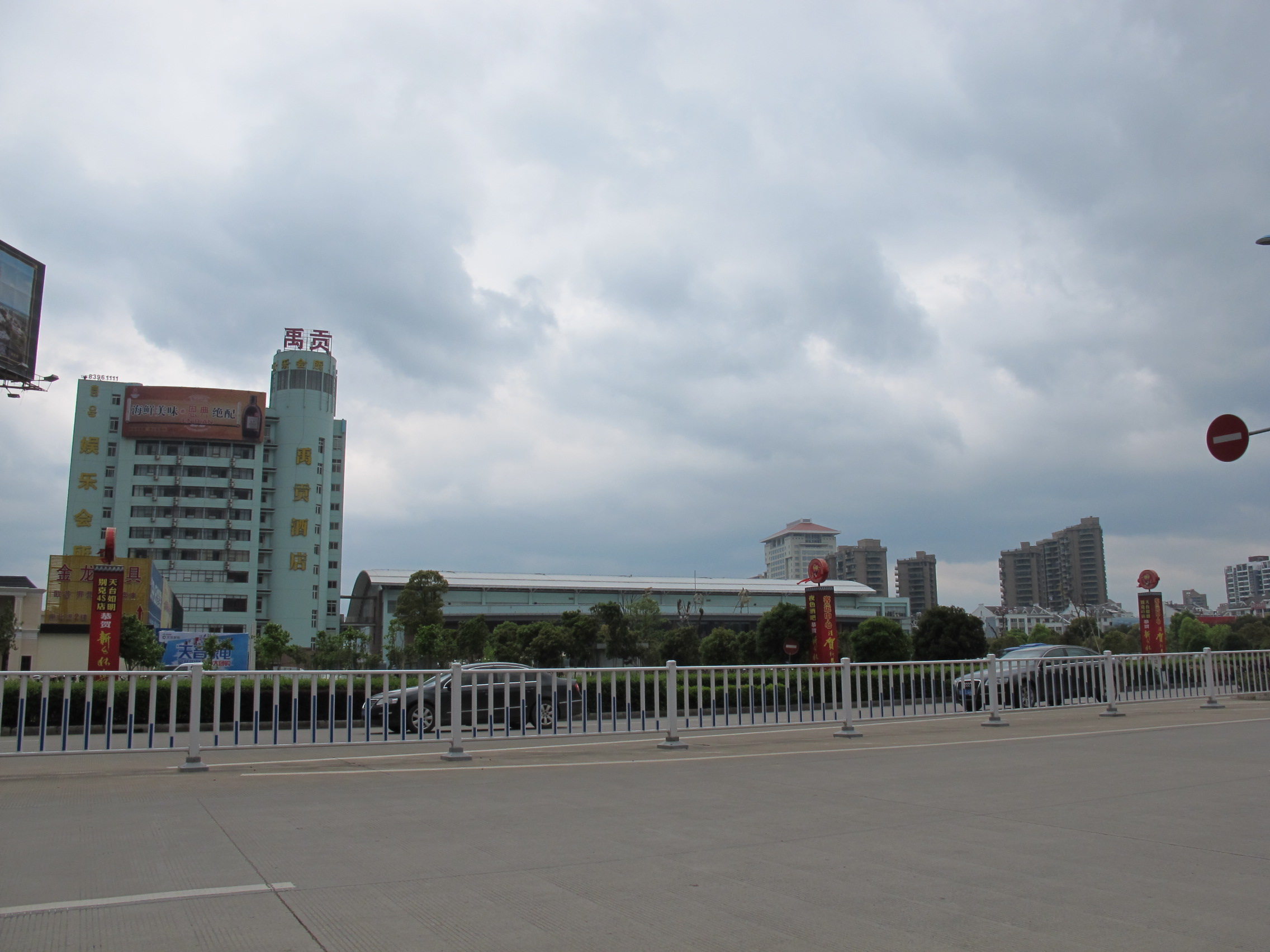 天台汽车站